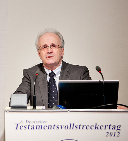 Dr. Karl Jan Schiffer als Redner beim 6. Deutschen Testamentsvollstreckertag 2012 in Bonn